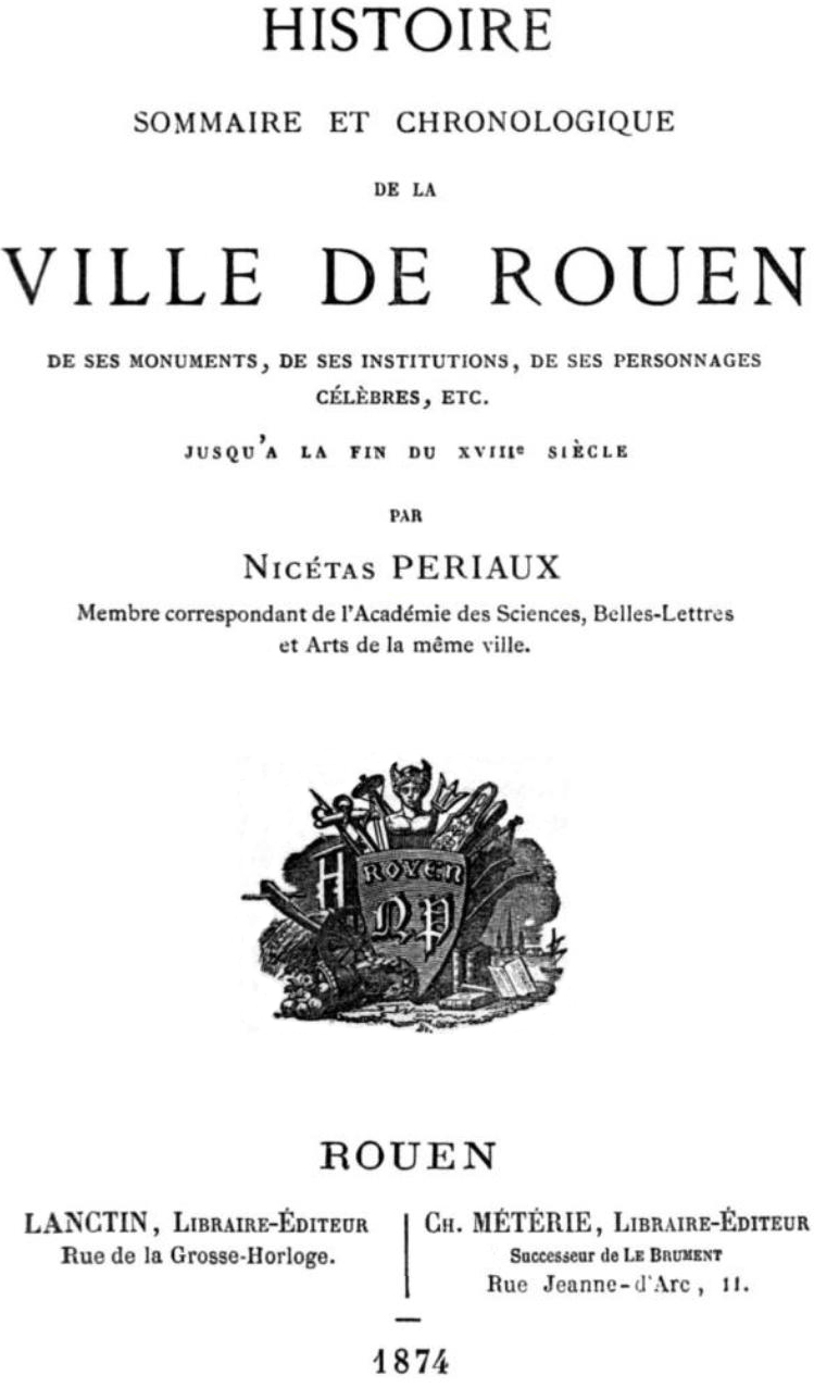 Nicétas Périaux's Histoire sommaire et chronologique de la ville de Rouen